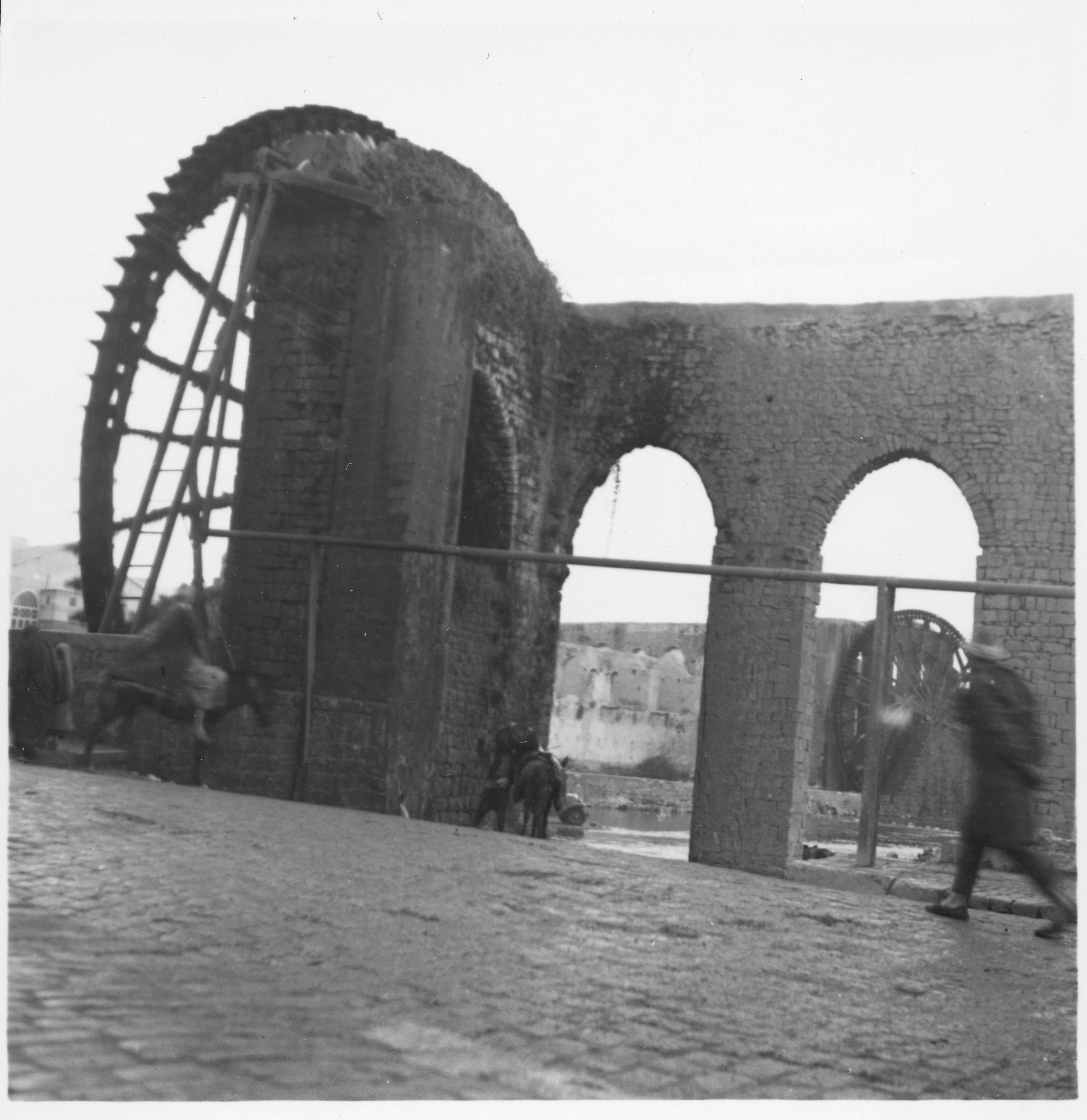 Syrien, Homs: Wasserschöpfräder (Norias); Wasserschöpfräder